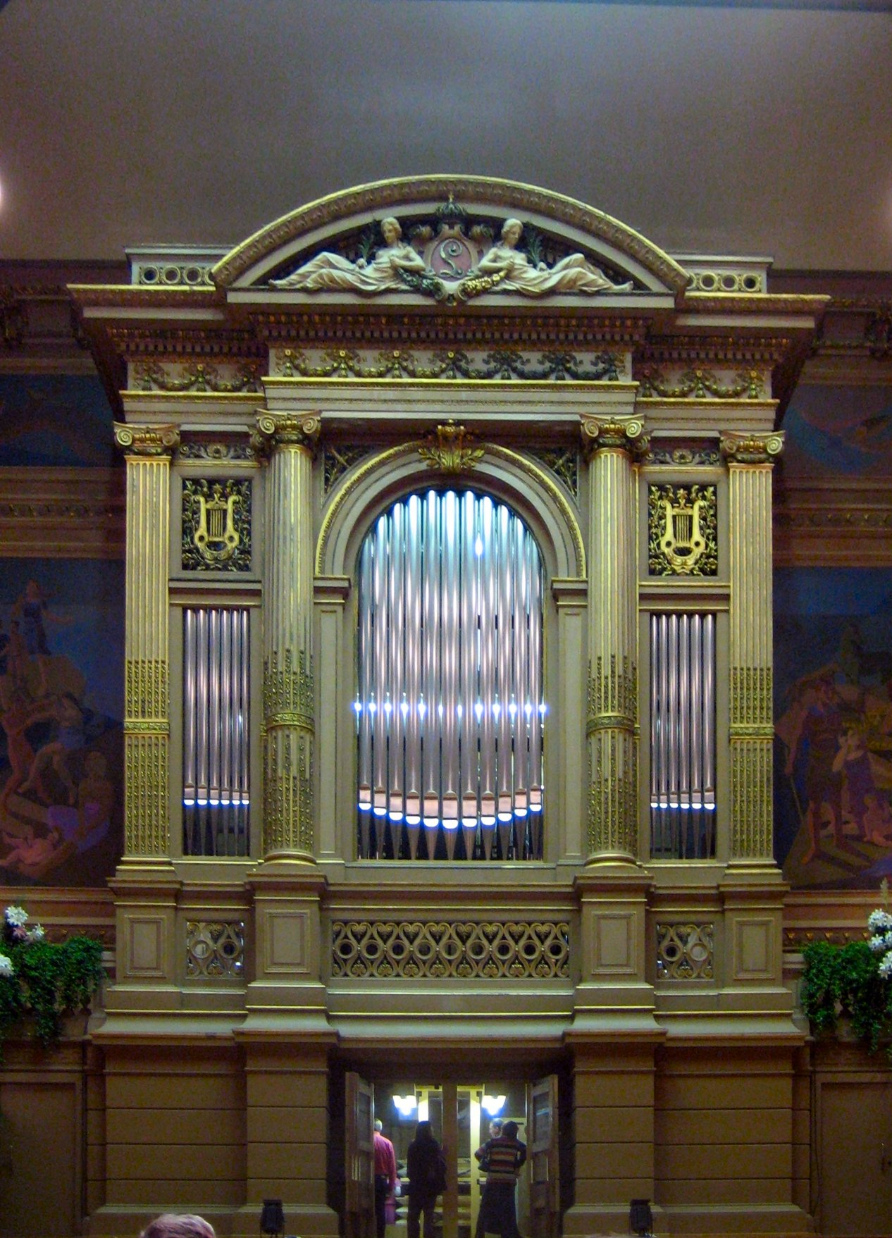 Schyven-Uergel an der Lécker Salle Philharmonique, den 30. September 2005 bei der Porte-ouverte no hirer Restauréierung.